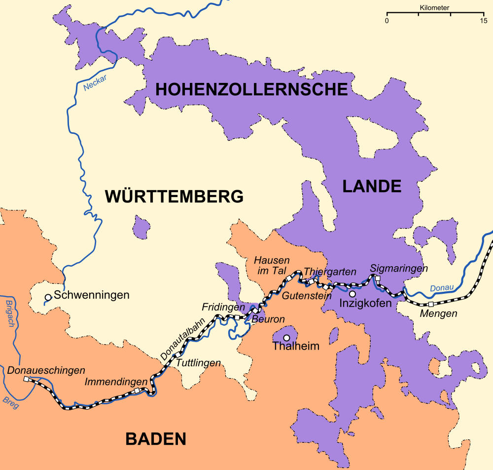 Verlauf der Donautalbahn durch Baden, Württemberg und den Hohenzollernschen Landen